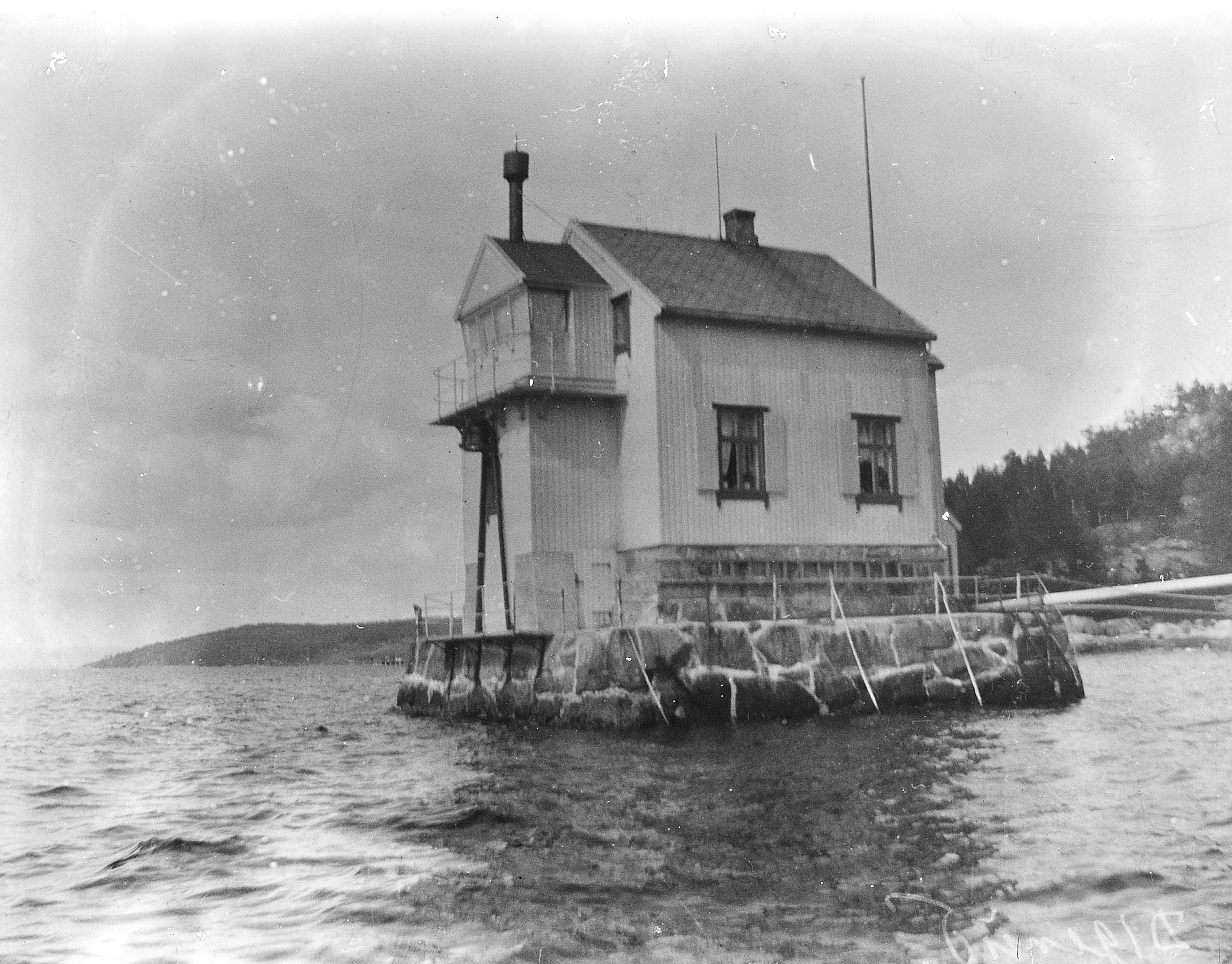 Bildet er hentet fra Arkivverket. Digerudgrunnen, Frogn, Akershus Arkivinstitusjon : Riksarkivet Arkivnavn : Fyrdirektoratet Sted : Norge, Akershus, Frogn, Digerudgrunnen Emneord: Fyr, Kyst Avbildet